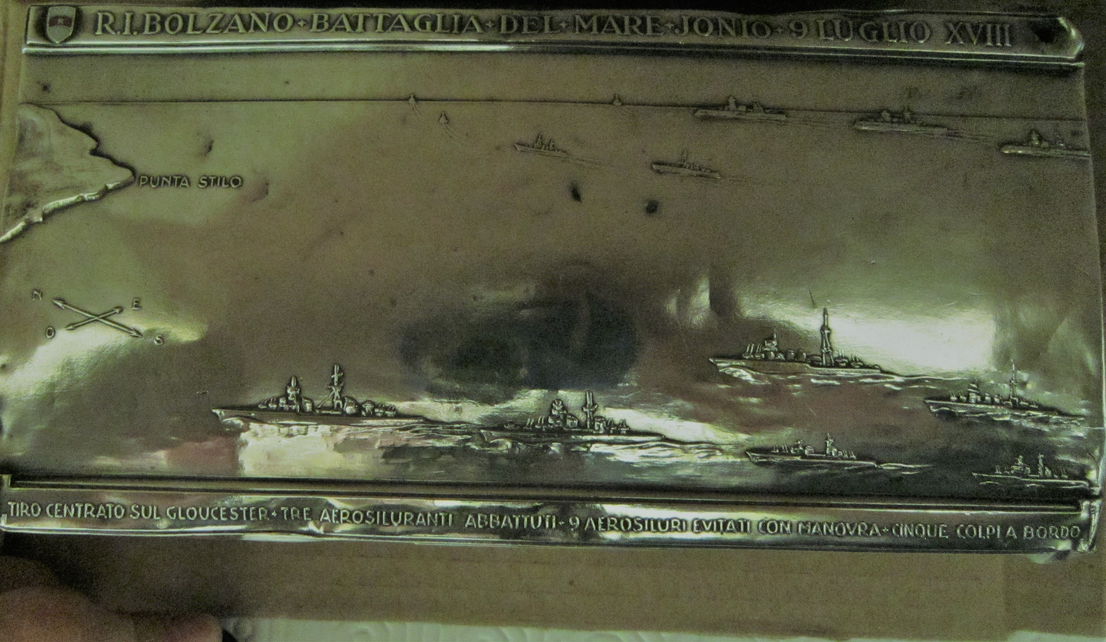 Scatola-teca in radica con coperchio in argento che commemora la battaglia di Punta Stilo. In basso la Squadra italiana, in alto la squadra inglese in ripiegamento. Sui bordi, in alto la descrizione del soggetto; in basso, la sintesi degli eventi a bordo.